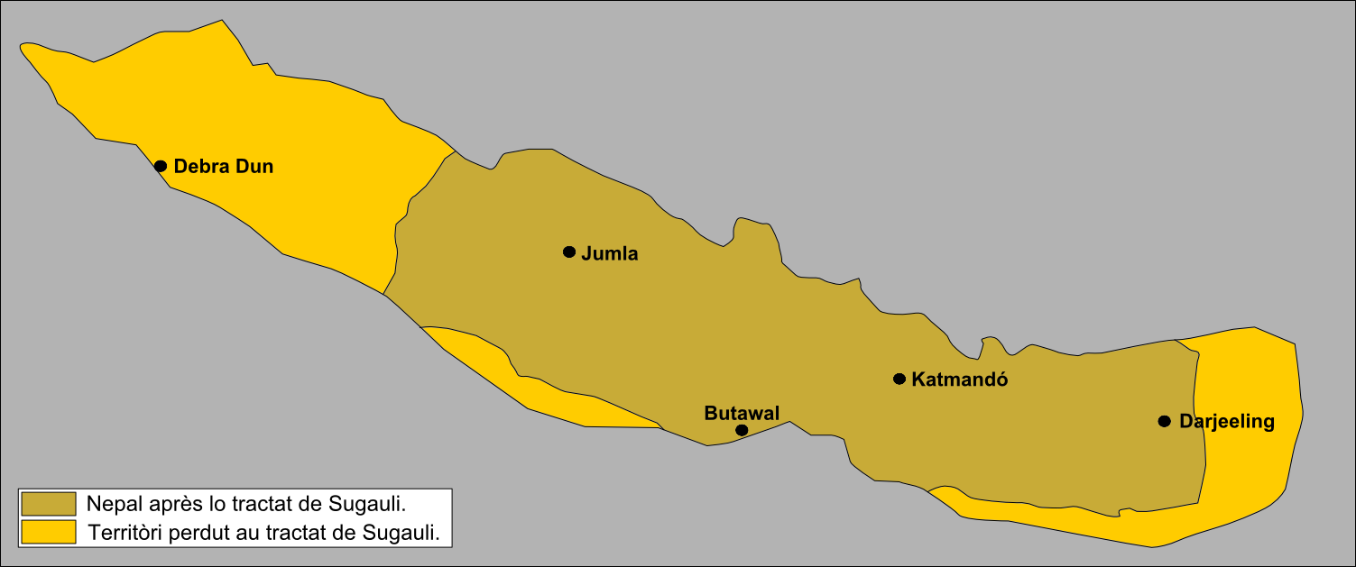 Pèrdas territòrialas nepalesas au tractat de Sugauli.